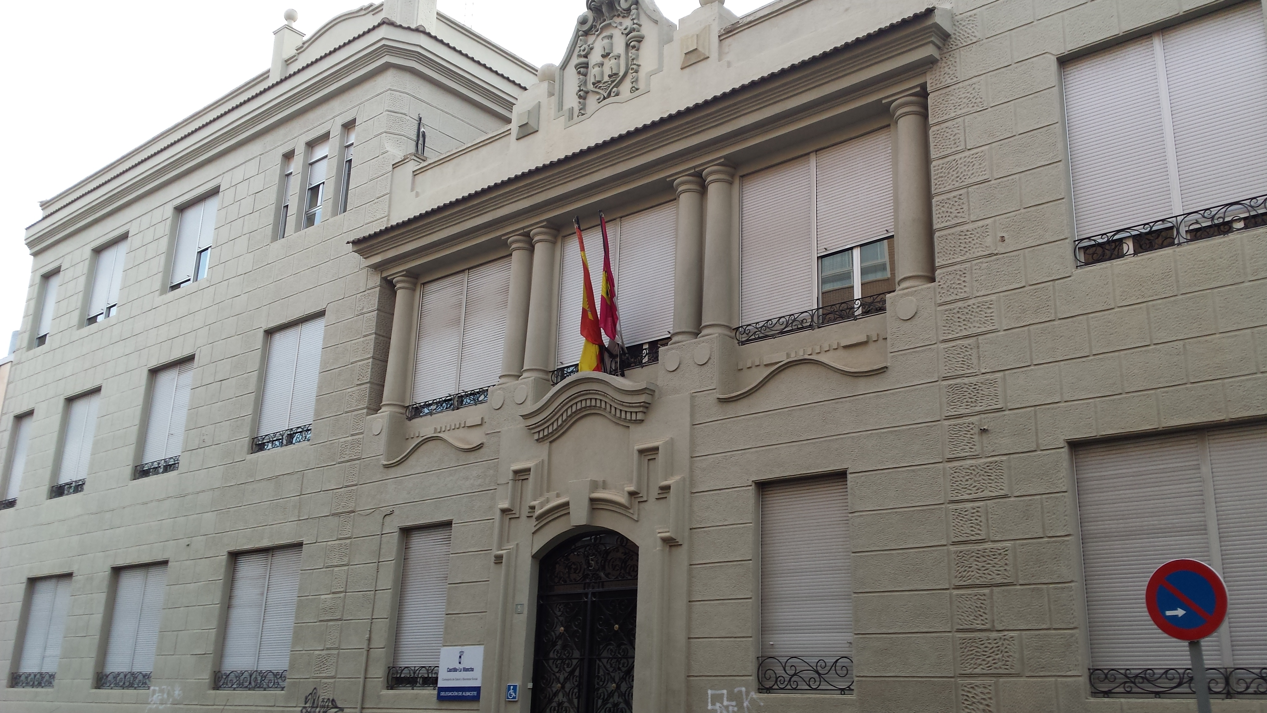 Palacio que alberga la sede de los Servicios Periféricos de la Consejería de Sanidad y Asuntos Sociales en Albacete.